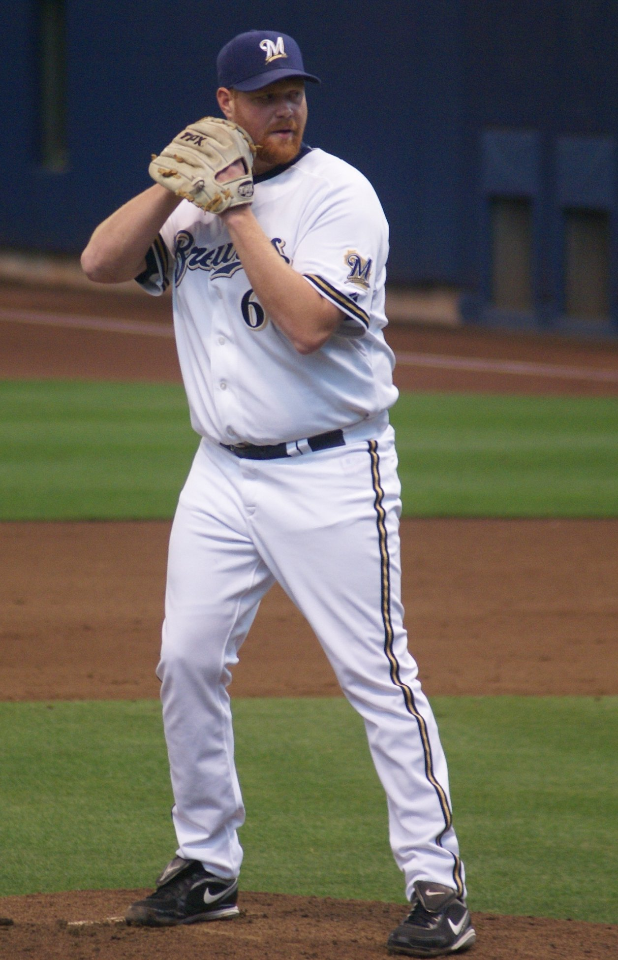 Todd Coffey